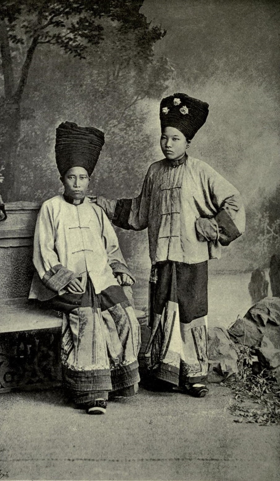 ミャンマー、バモーの女性たち